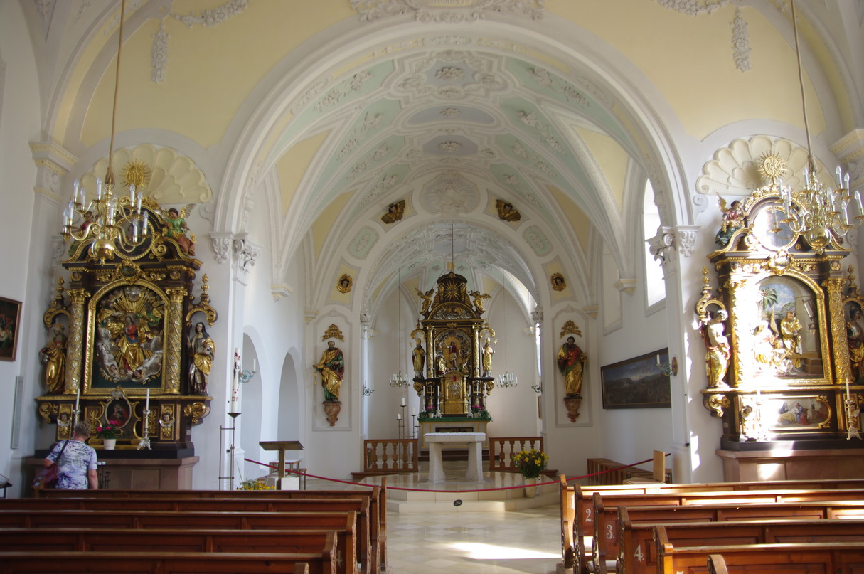 St. Michael Kirchenschiff Seeshaupt